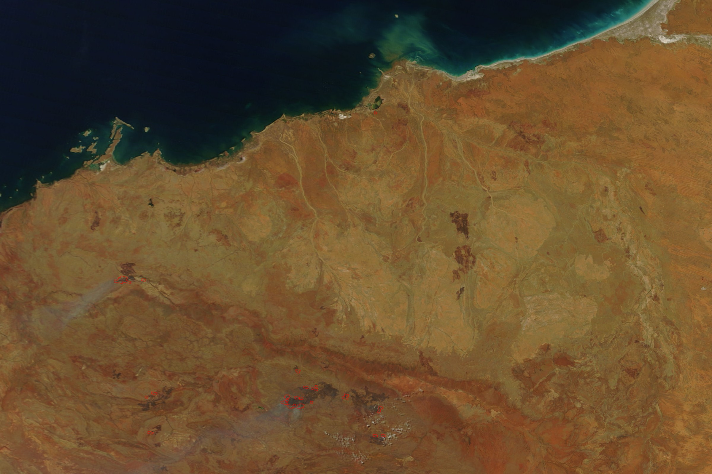 Zdjęcie satelitarne kratonu Pilbara w Australii Zachodniej